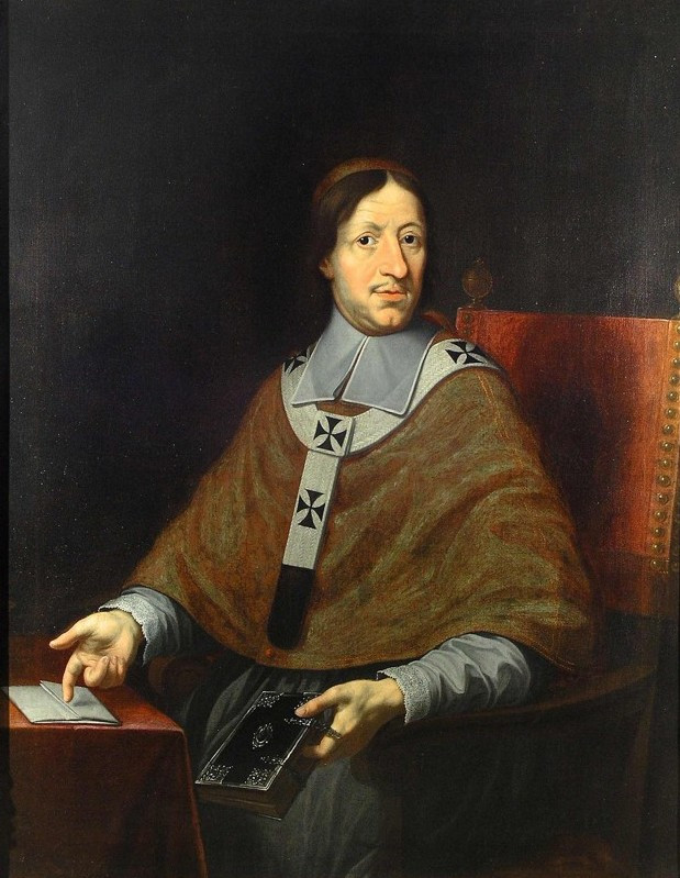 Jan Josef hrabě Breuner, olomoucký světící biskup